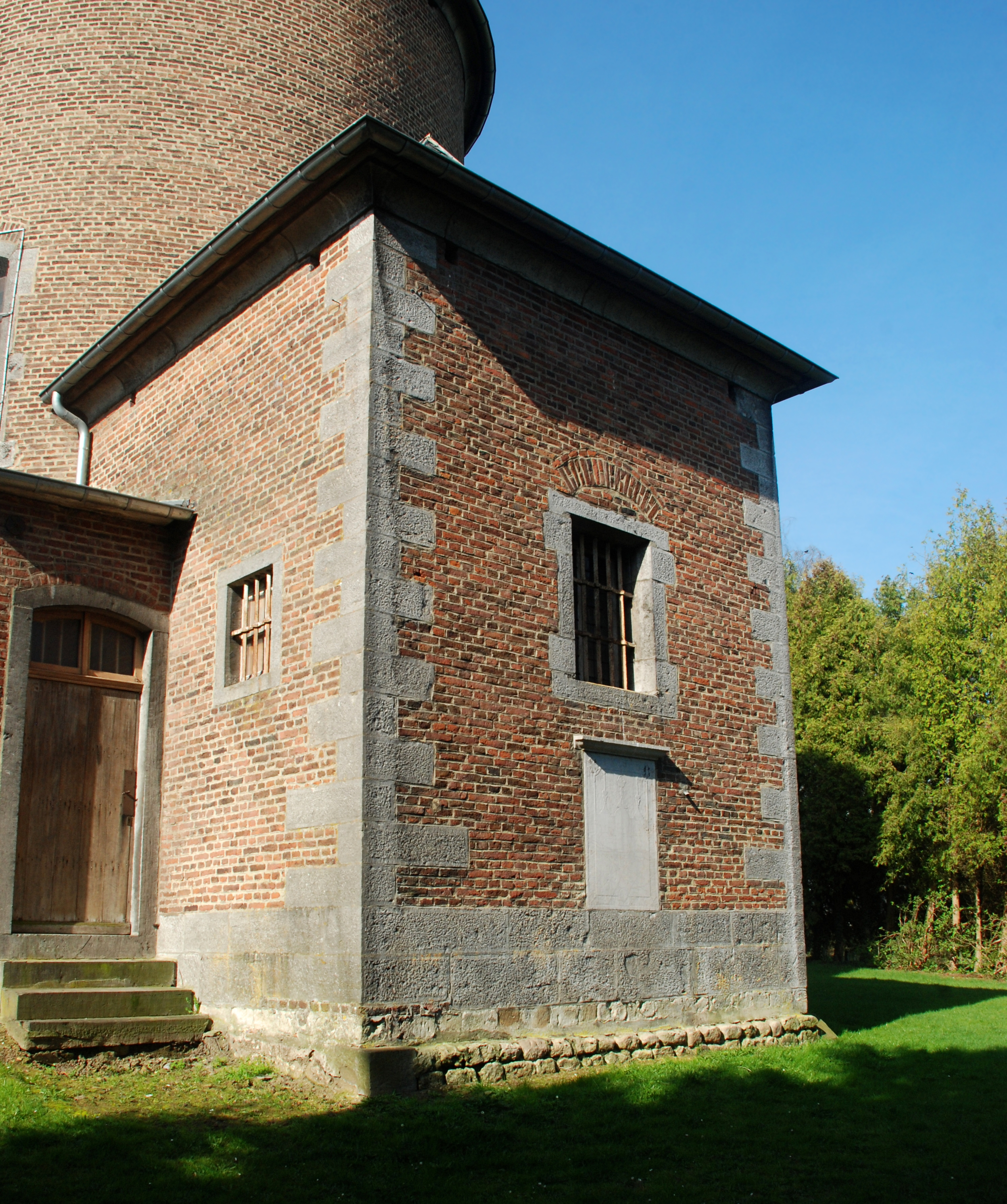 Belgique - Brabant wallon - Genappe - Baisy-Thy - Église Saint-Hubert